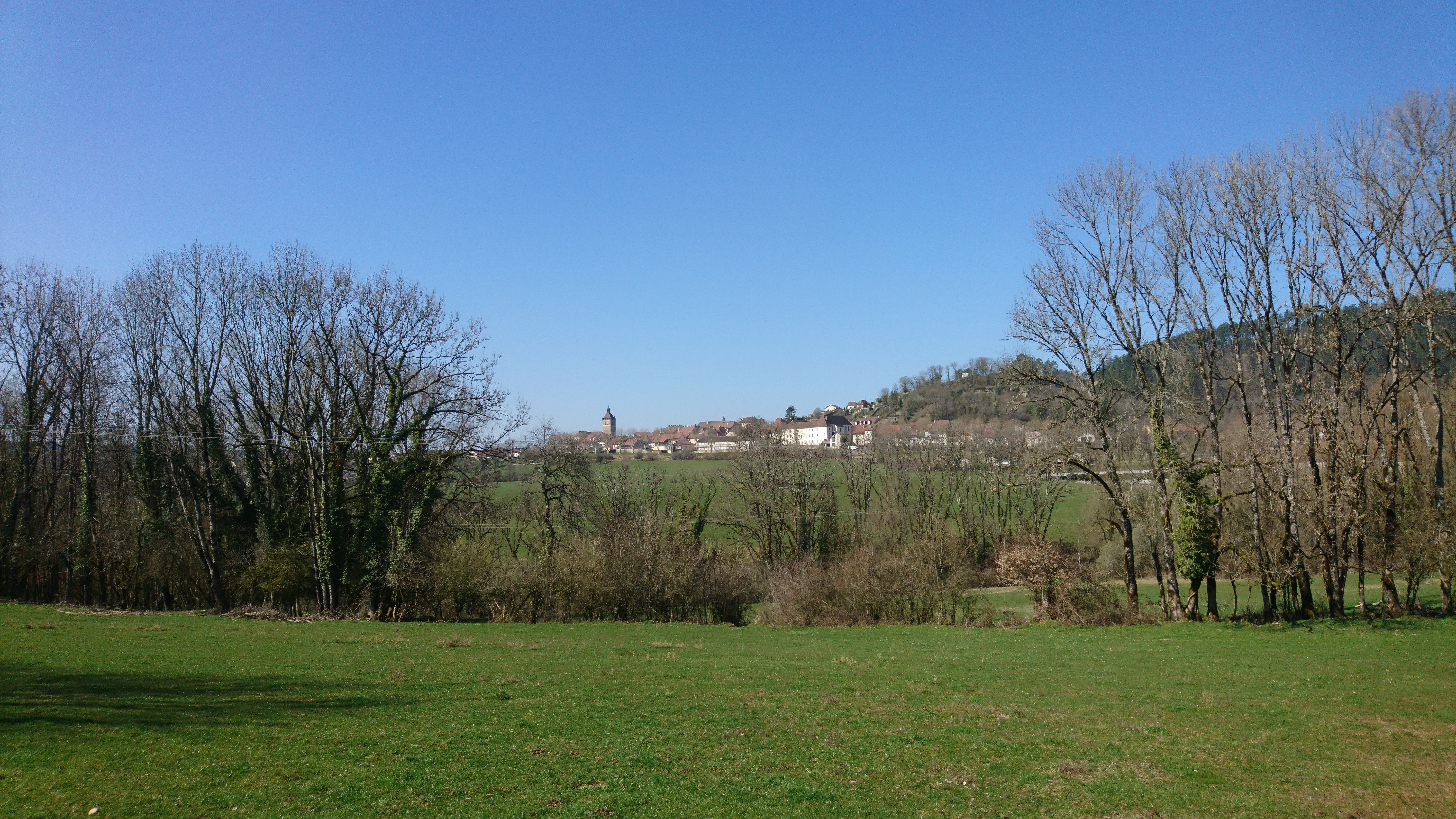 En direction d'Ecrille